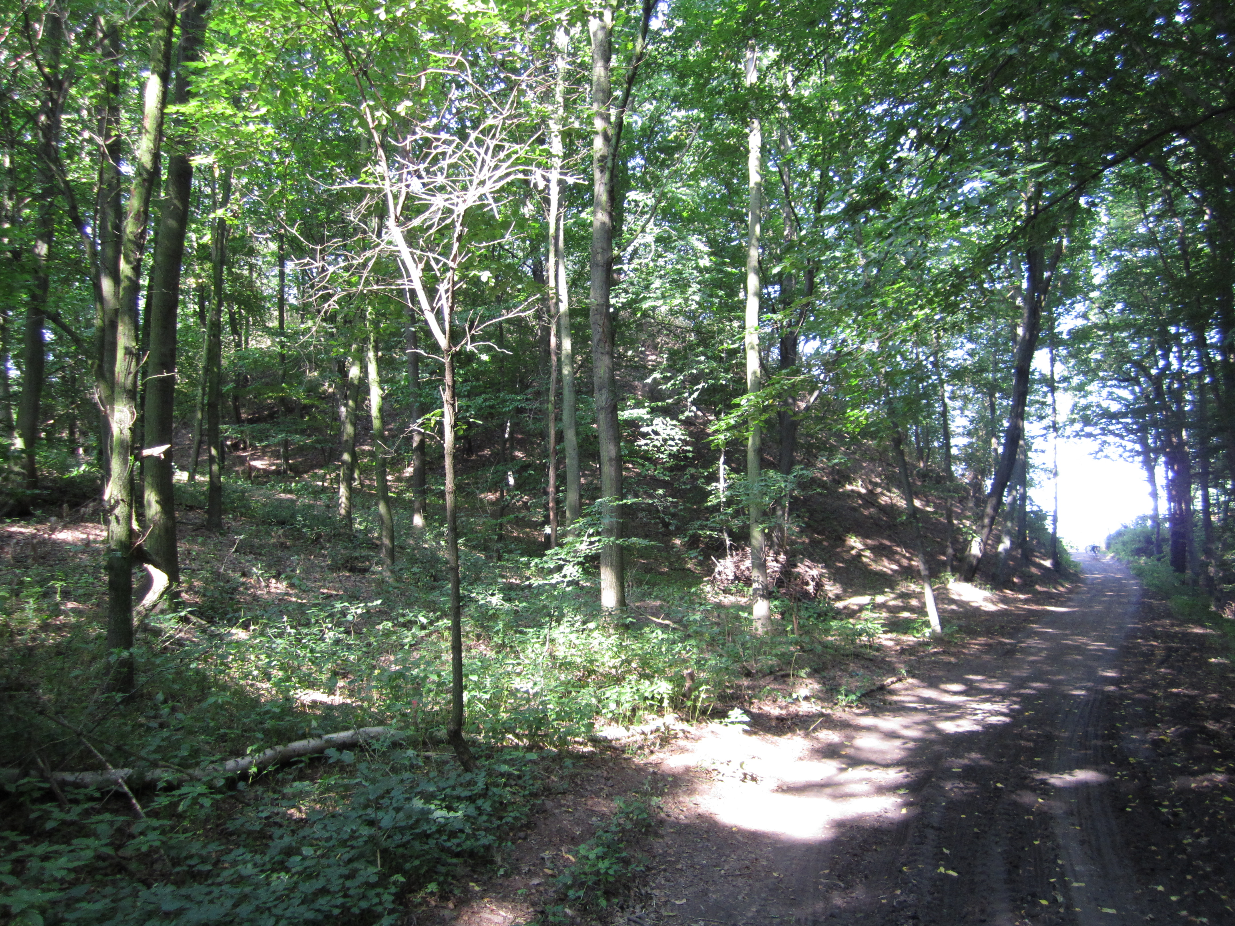 Wall der Wallburg Löbsal